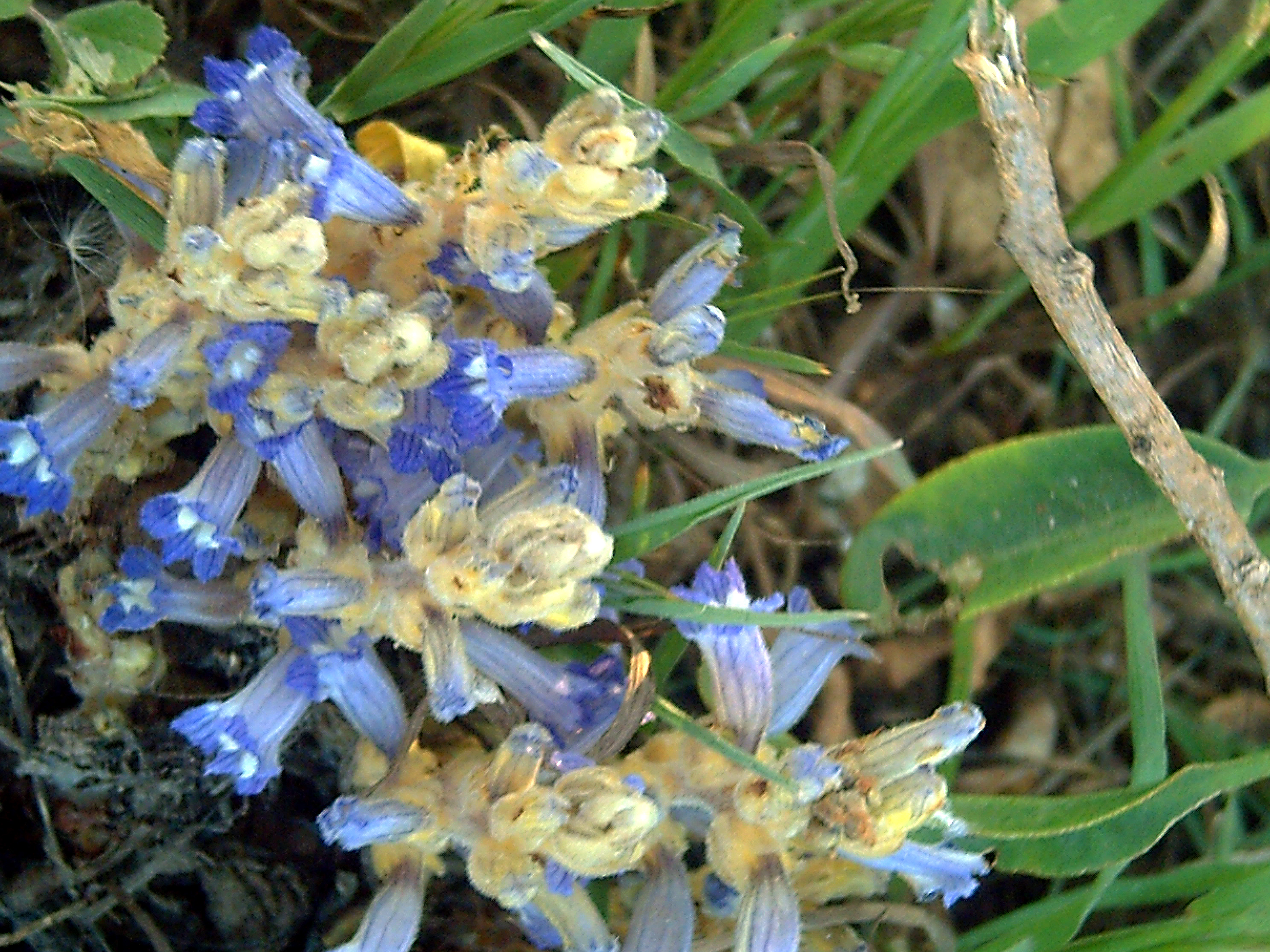 Orobanche ramosa, Parque Natural de las Lagunas de La Mata y Torrevieja, Torrevieja, Alicante, Spain